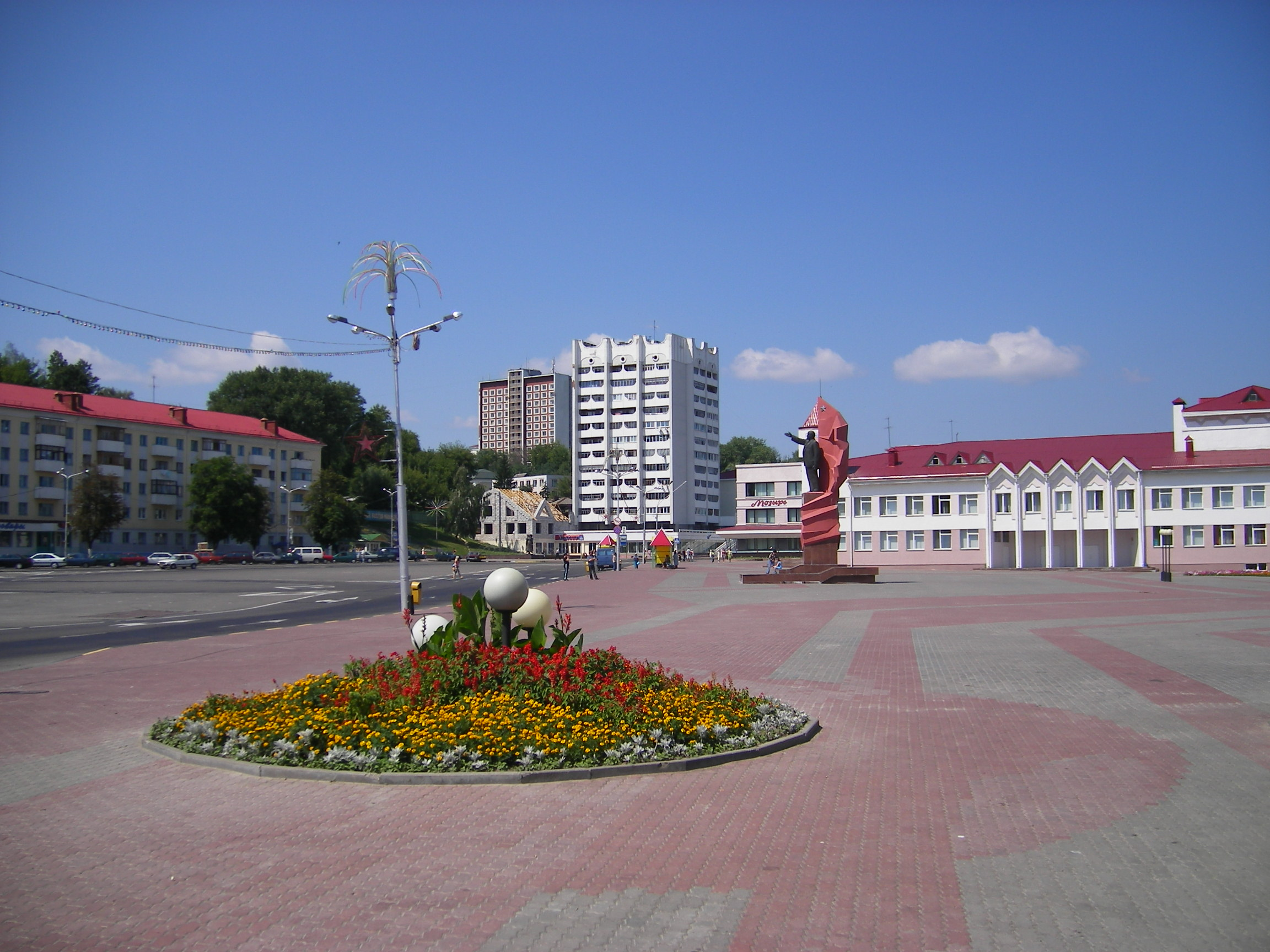 Mazyr, Lenin square